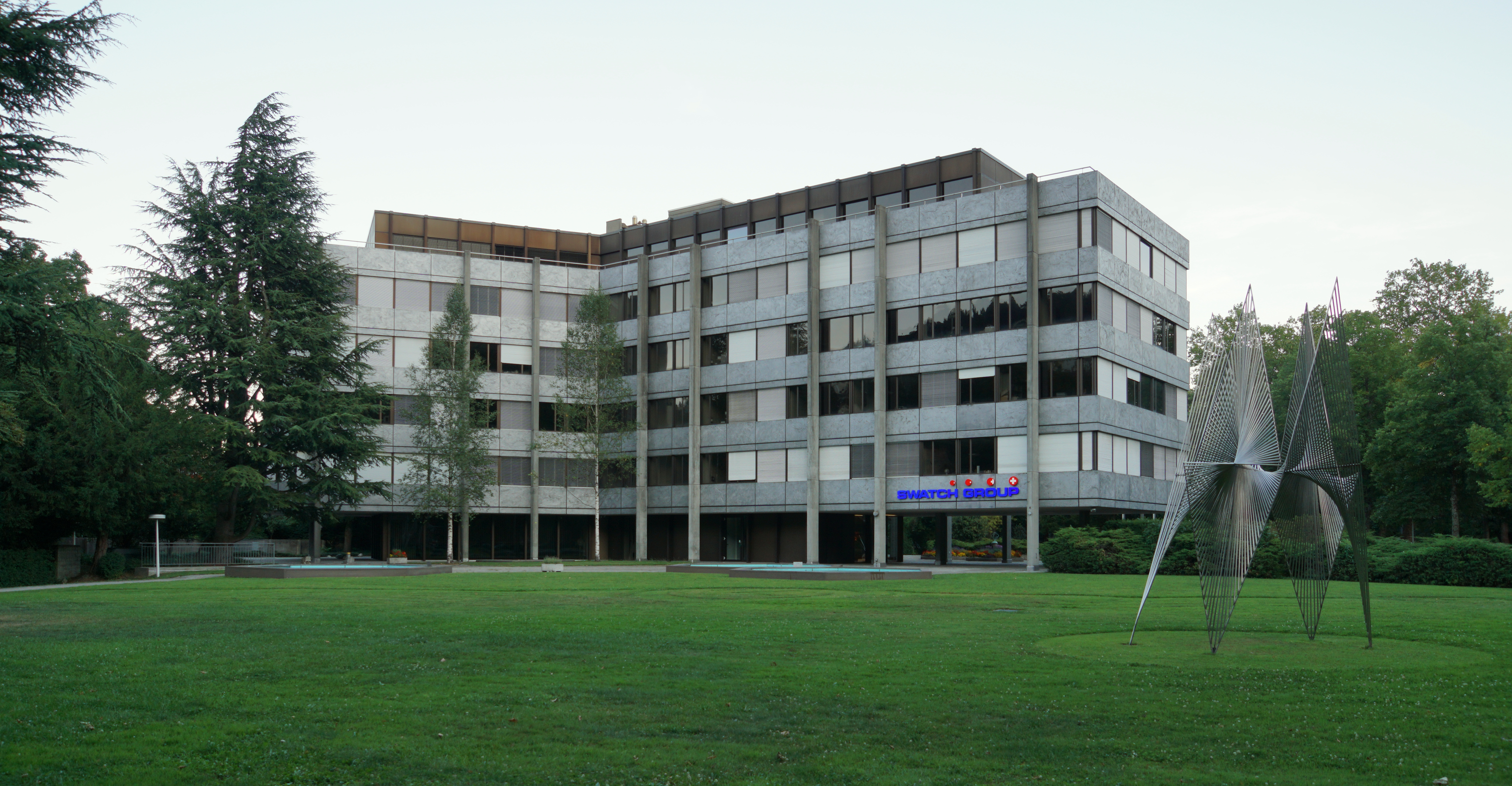 Ehemaliges Hauptgebäude der Omega, heutiger Sitz der Swatch Group in Biel